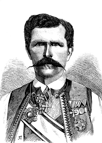 Ilija Plamenac